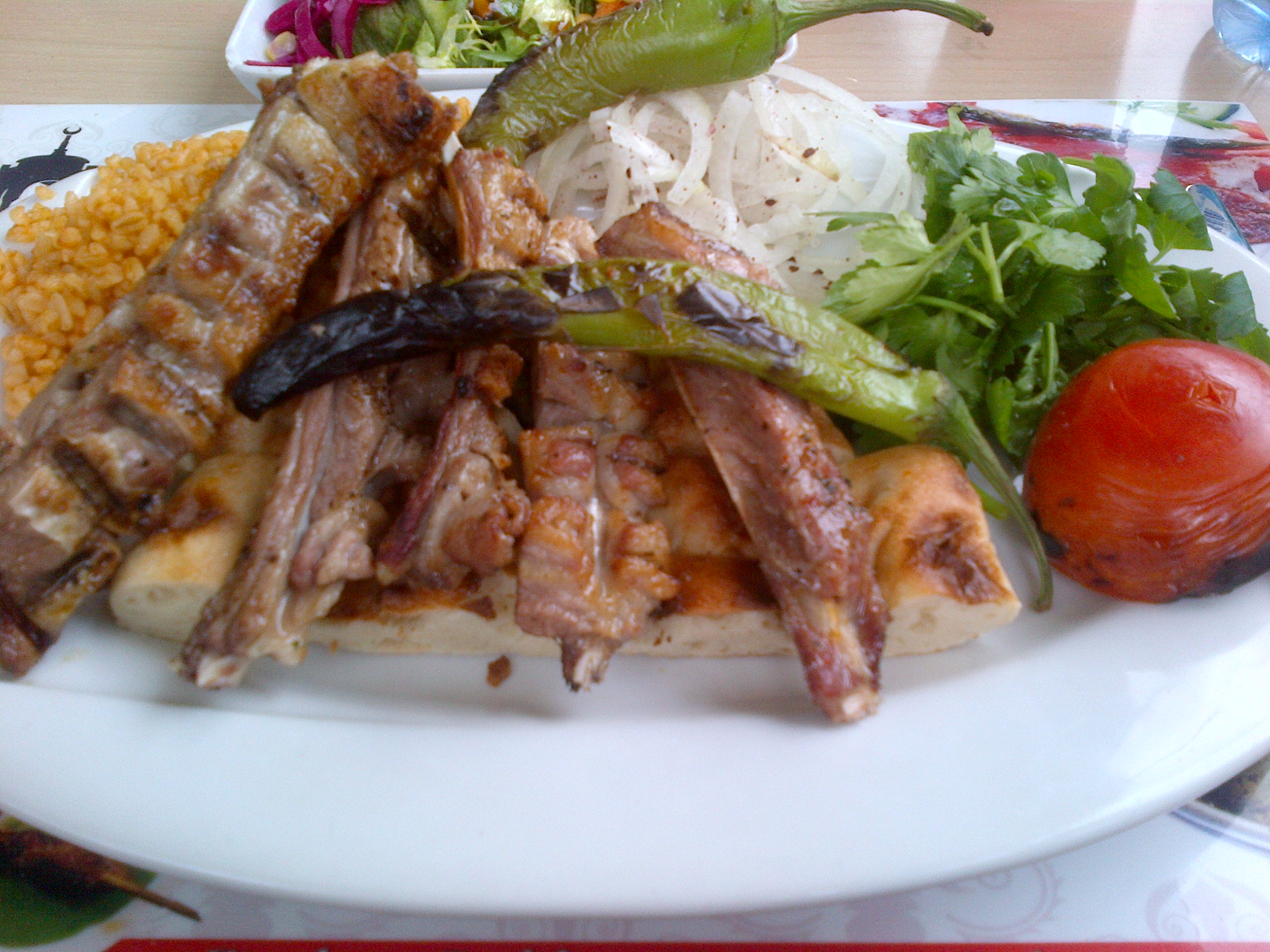 "Kuzu kaburga" o la parte con menos carne de las chuletas de cordero, de la cocina turca, at a "kebapçı" in Ankara.